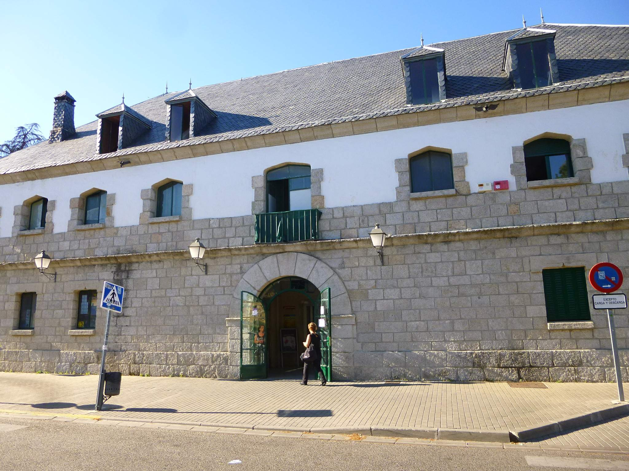 Colmenar Viejo - Estación de tren